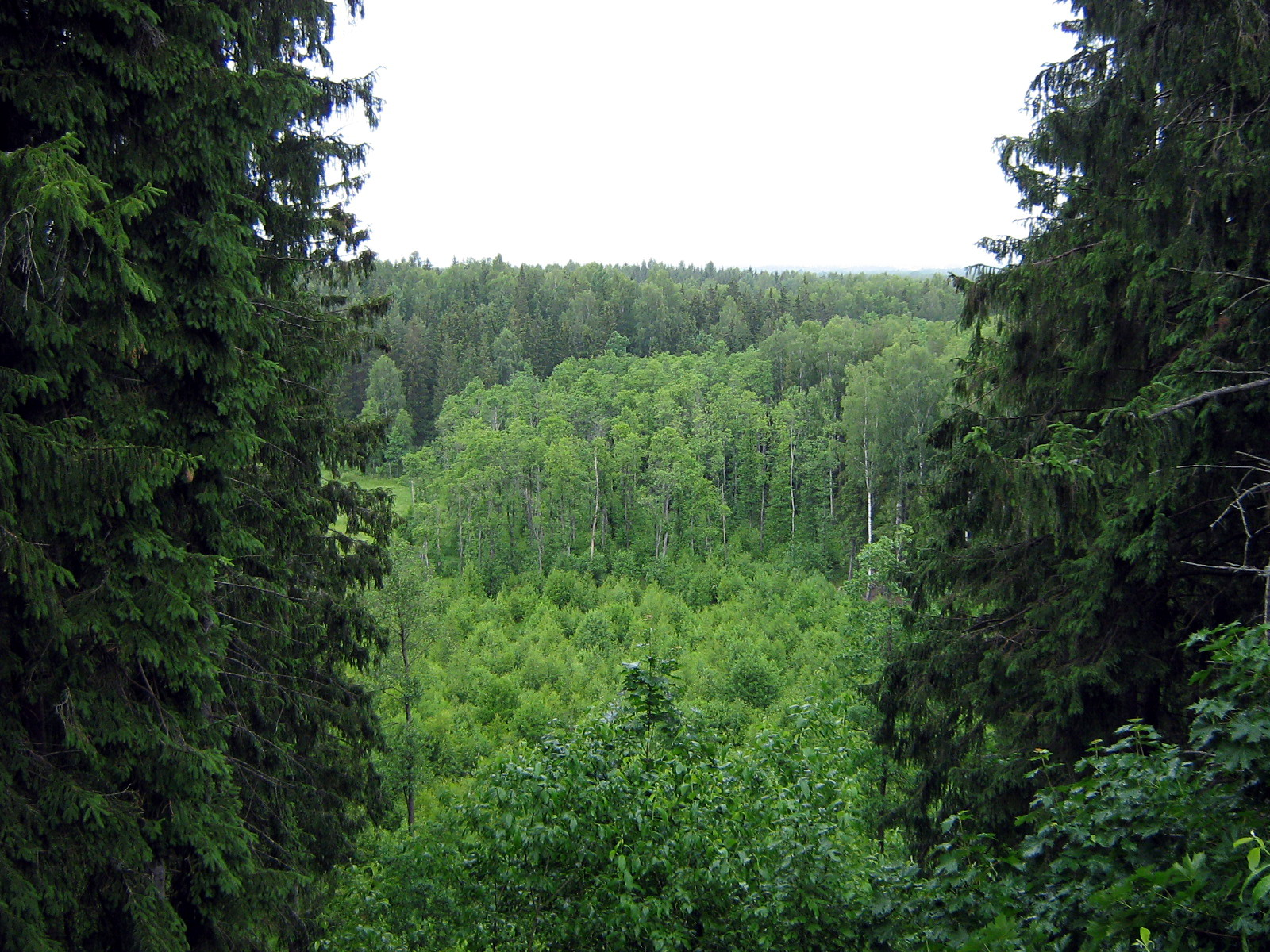 Mikytų kraštovaizdžio draustinis, Plungės rajonas, Žemaitijos nacionalinio parko teritorija Foto: Algirdas, 2007 m. birželio 15 d., Lietuva